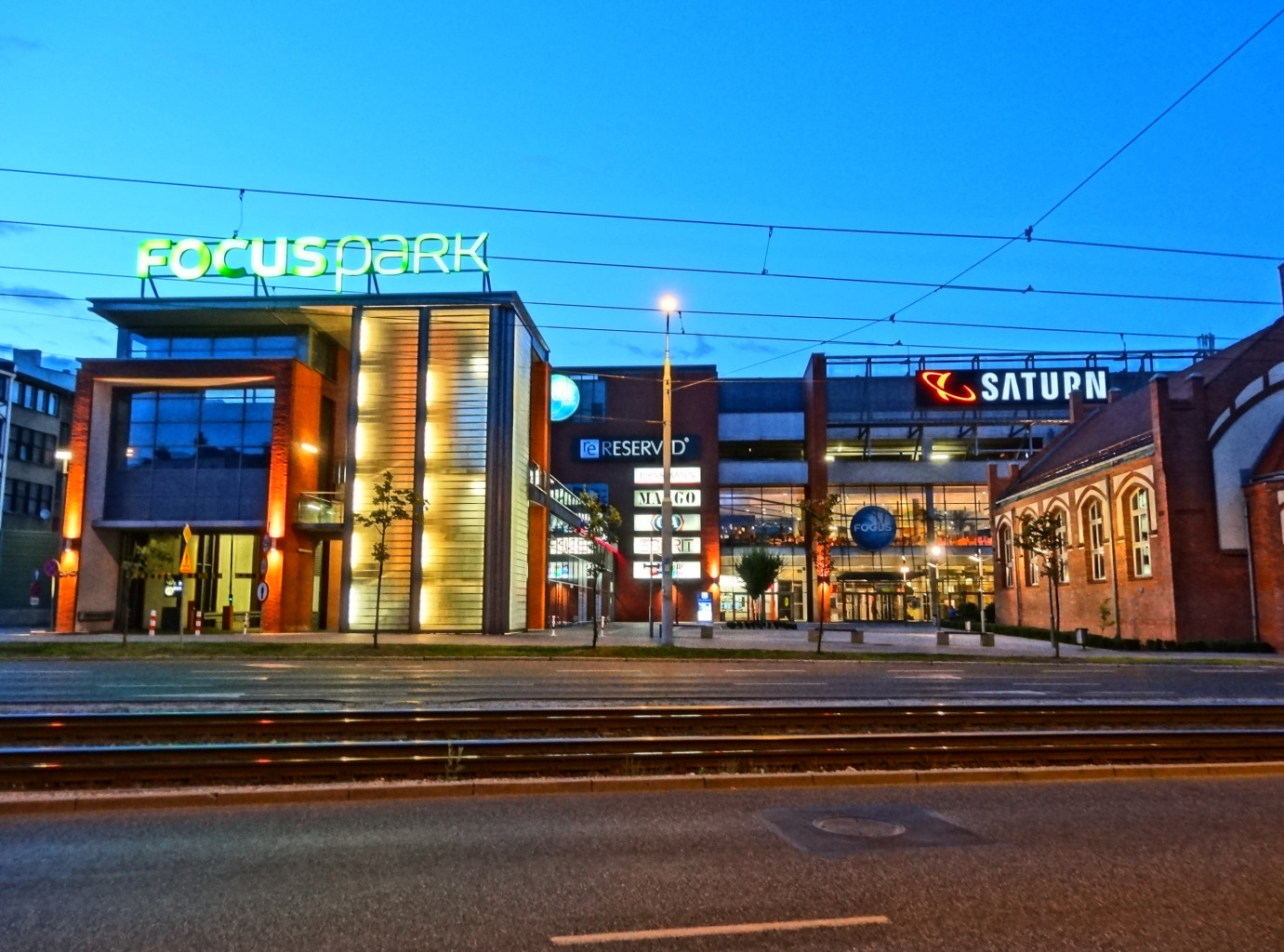 Centrum handlowe Focus Mall w Bydgoszczy przy ulicy Jagiellońskiej